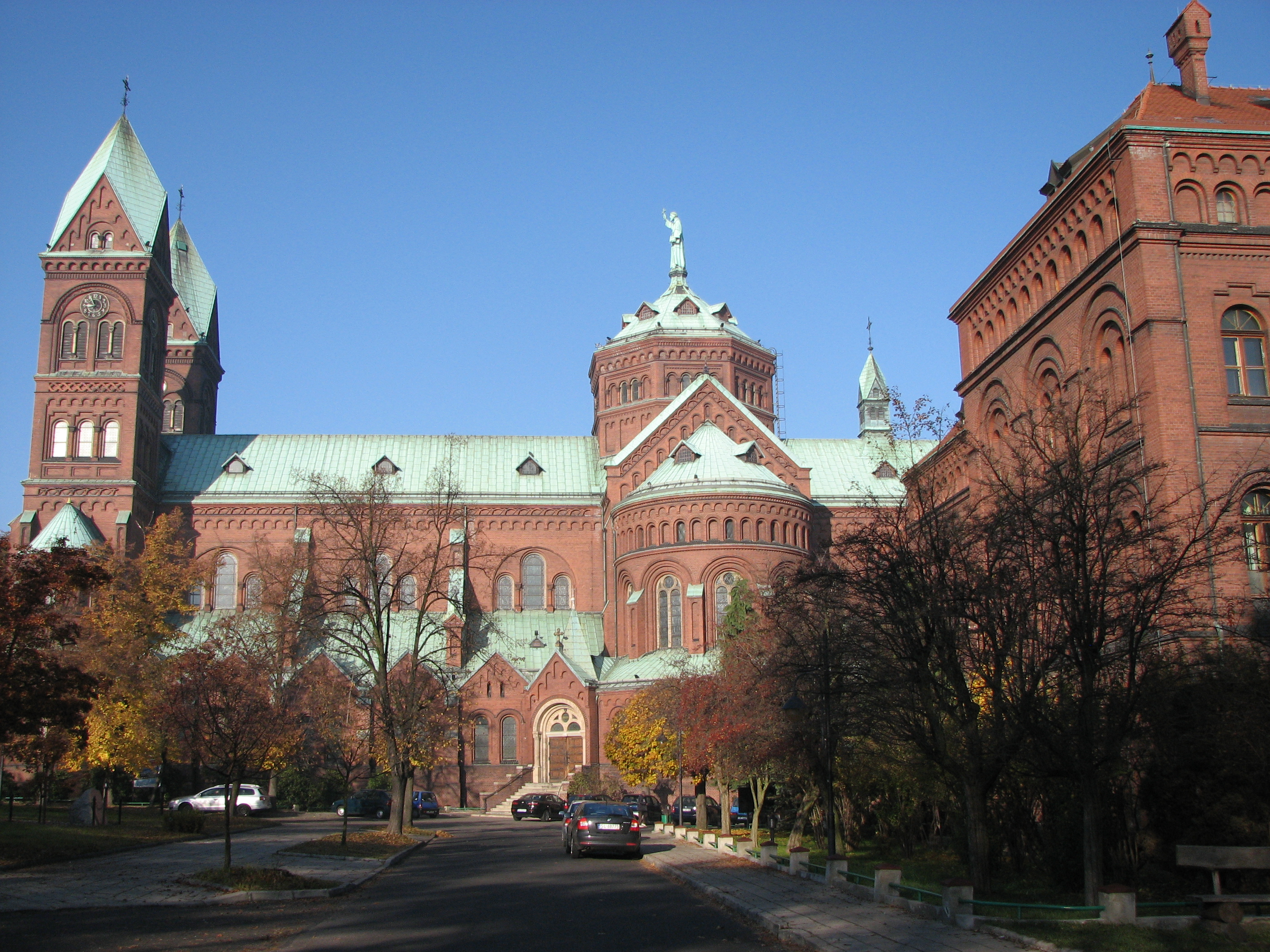 Franciscan monastery in Katowice Panewniki, Poland.